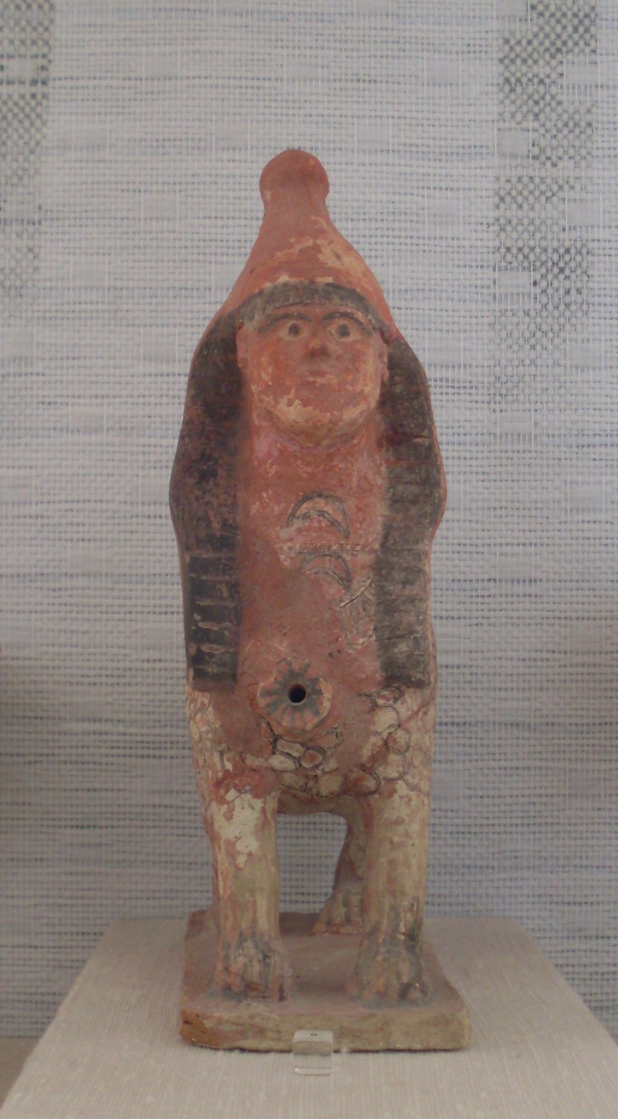 Tunisie, Musée de Carthage, Sphinx